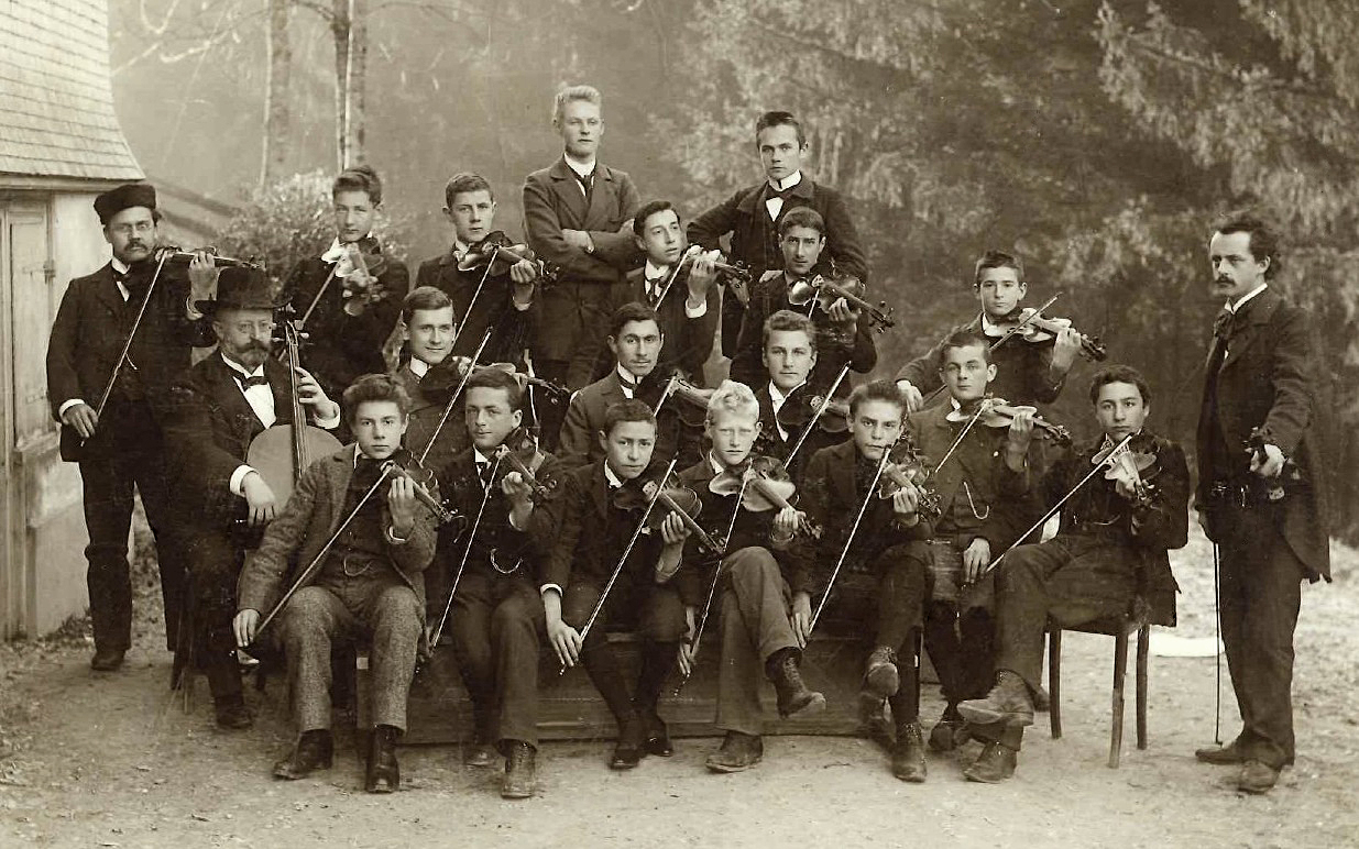 Hausorchester des Knabenkonvikts, Kantonsschule Trogen